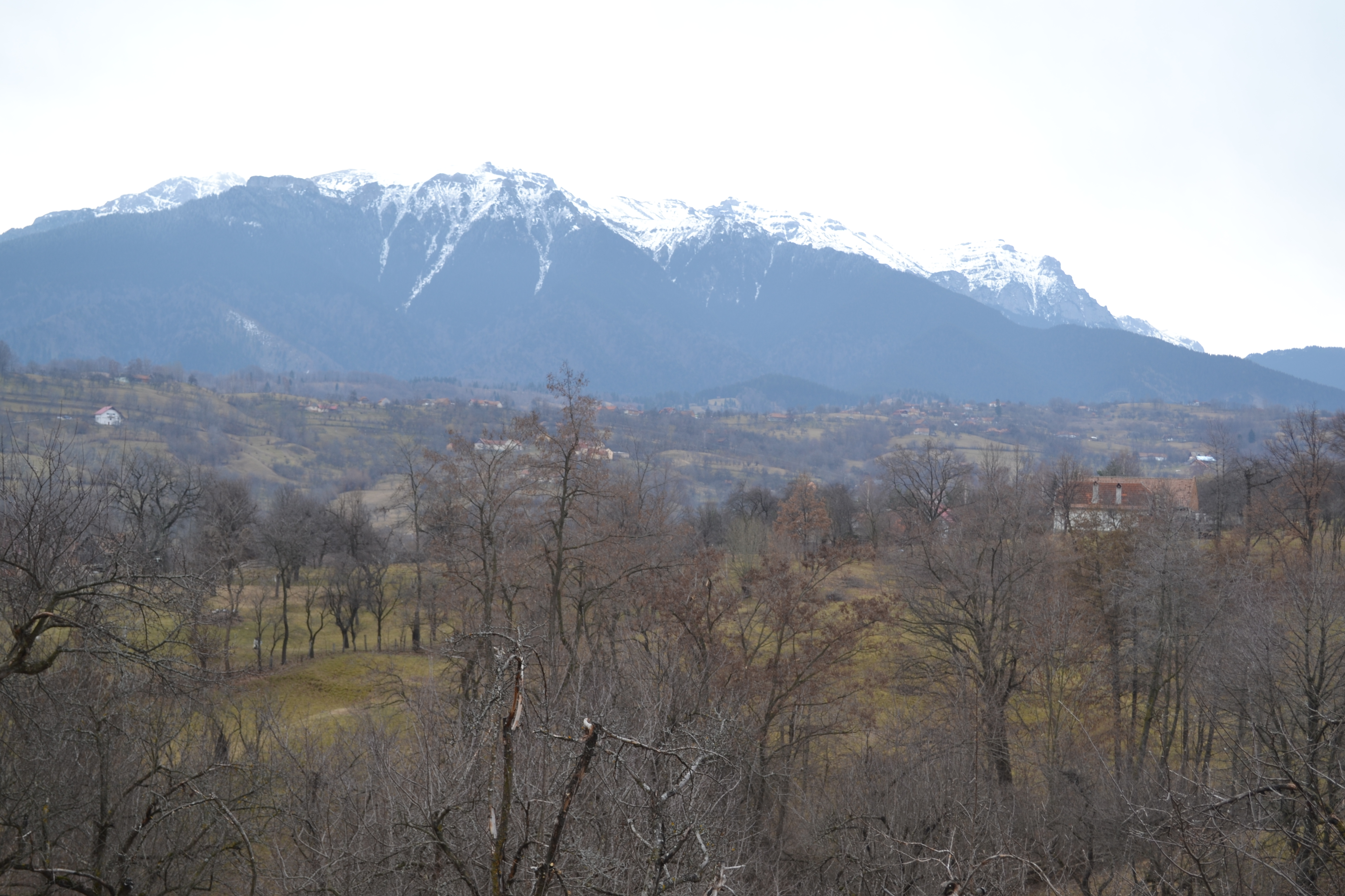 Sohodol